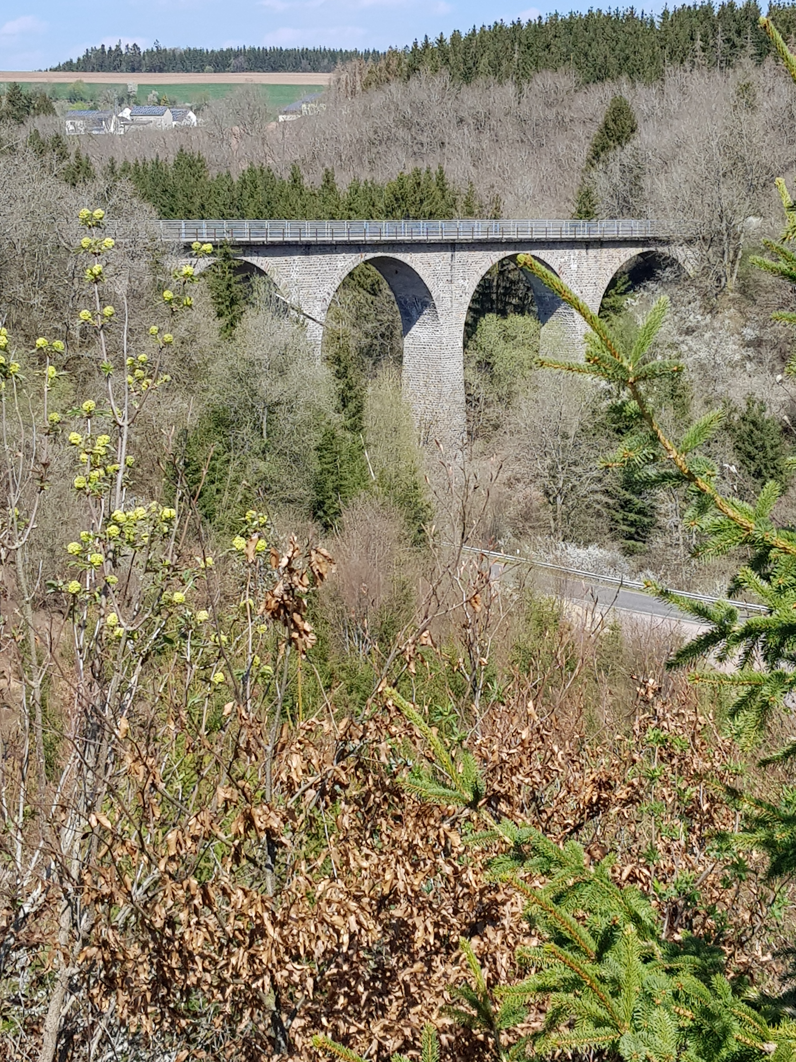 Eisenbahnviadukt bei Strickscheid, auf dem die ehem. Bahnstrecke Pronsfeld-Neuerburg die Straße nach Euscheid überquert.